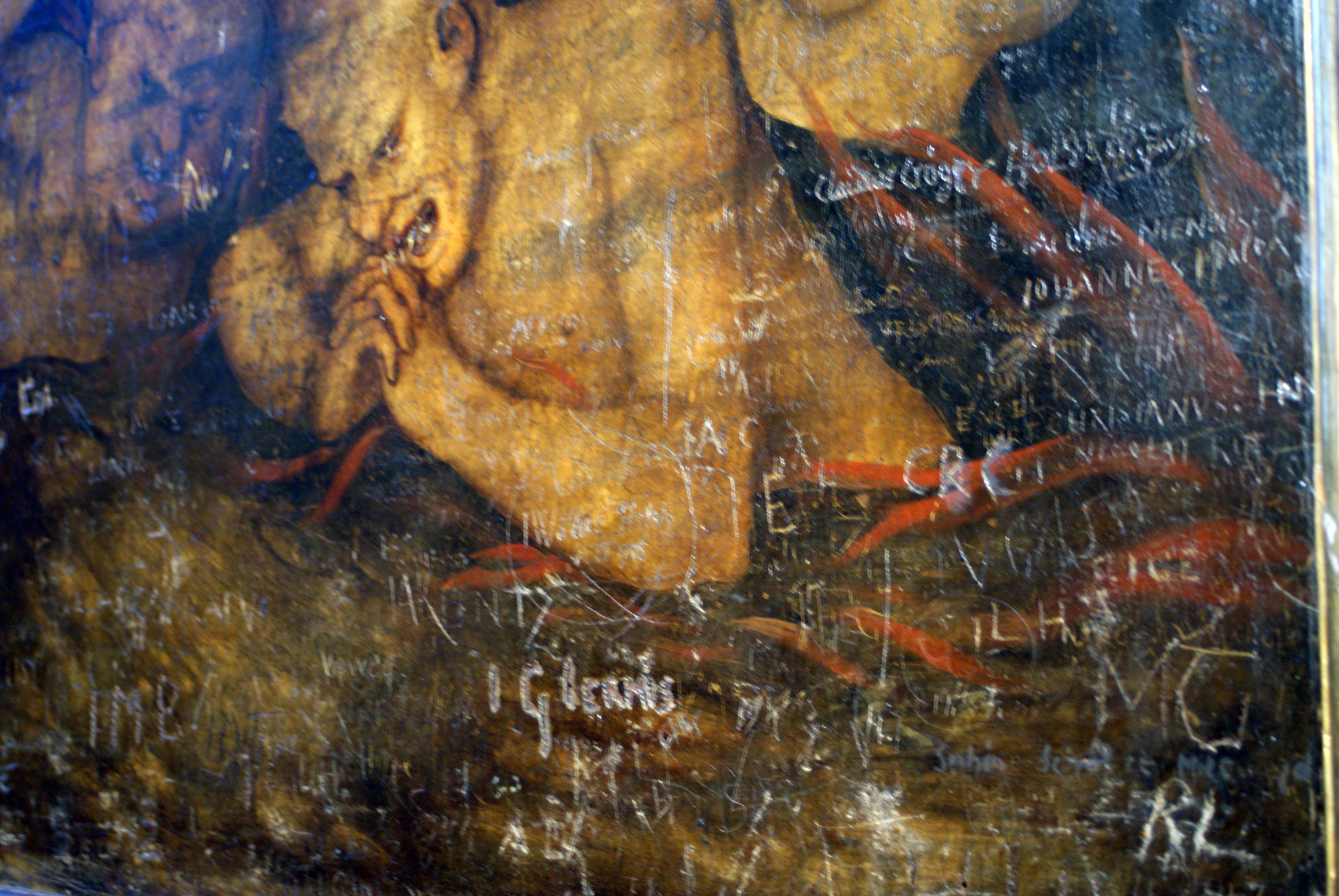 Beschädigungen an Bild am Cranachaltar in der Stadtkirche